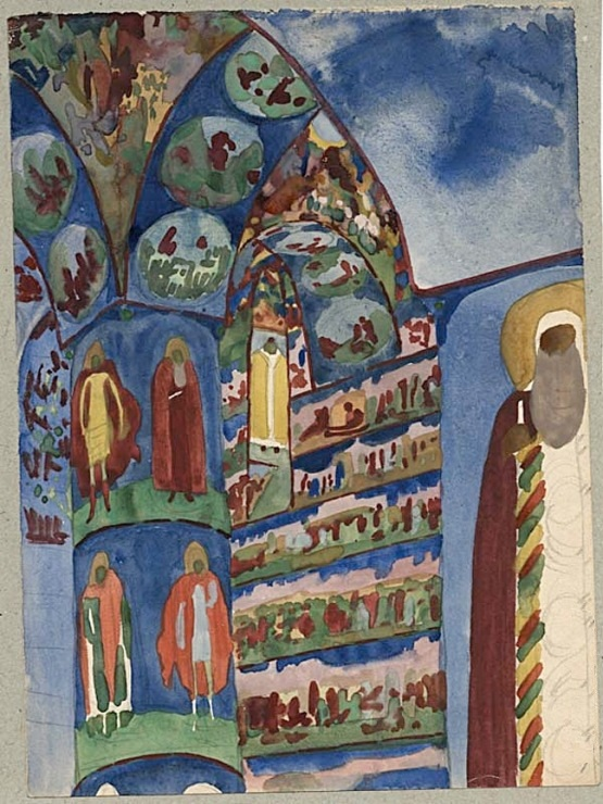 Произведения художника Николая Андреевича Тырсы (1887 — 1942). Интерьер церкви Николы Мокрого в Ярославле. Бумага, карандаш, гуашь, 25 х 16,6 см